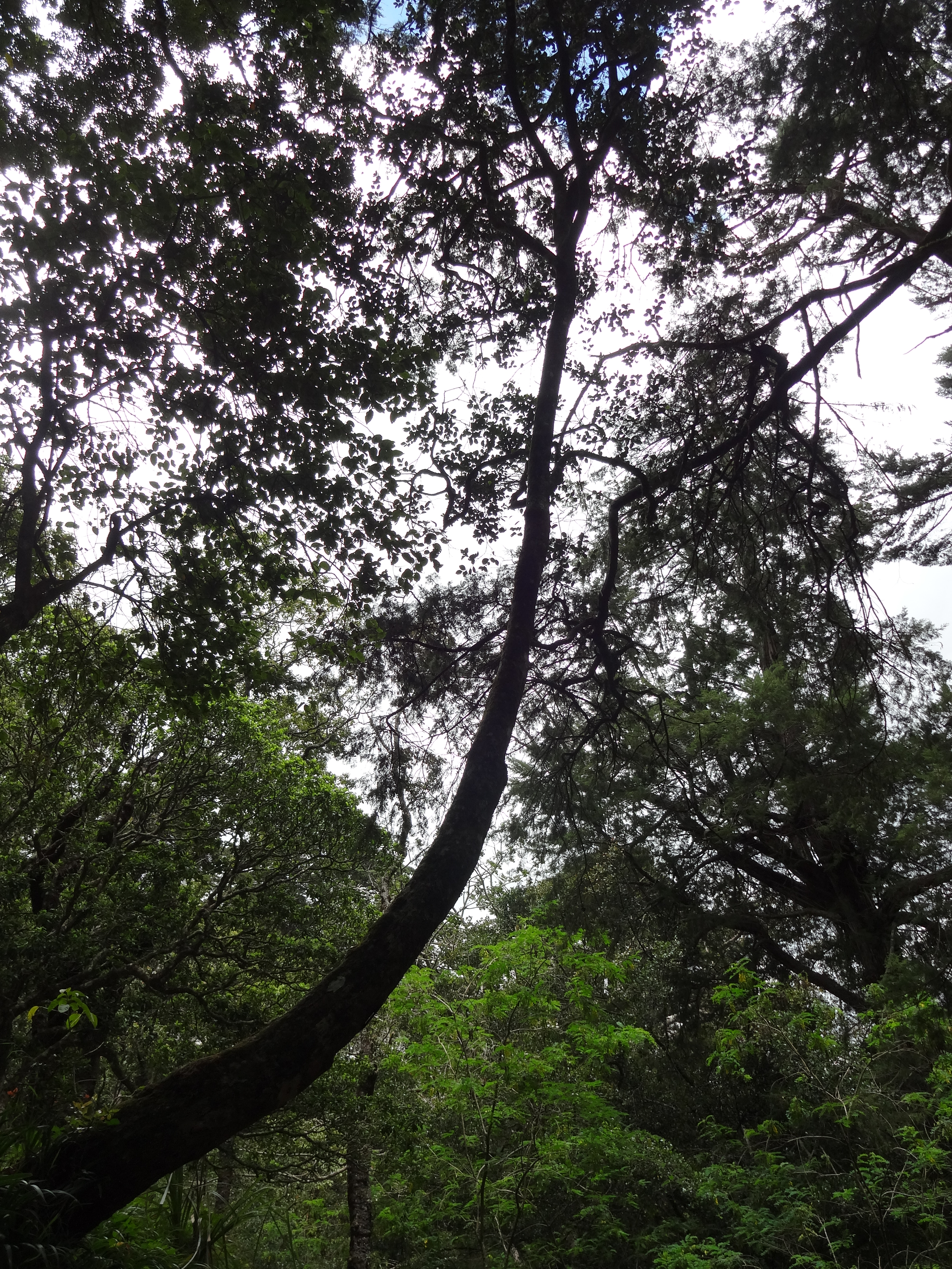 Memecylon parvifolium in Hakgala Botanical Garden